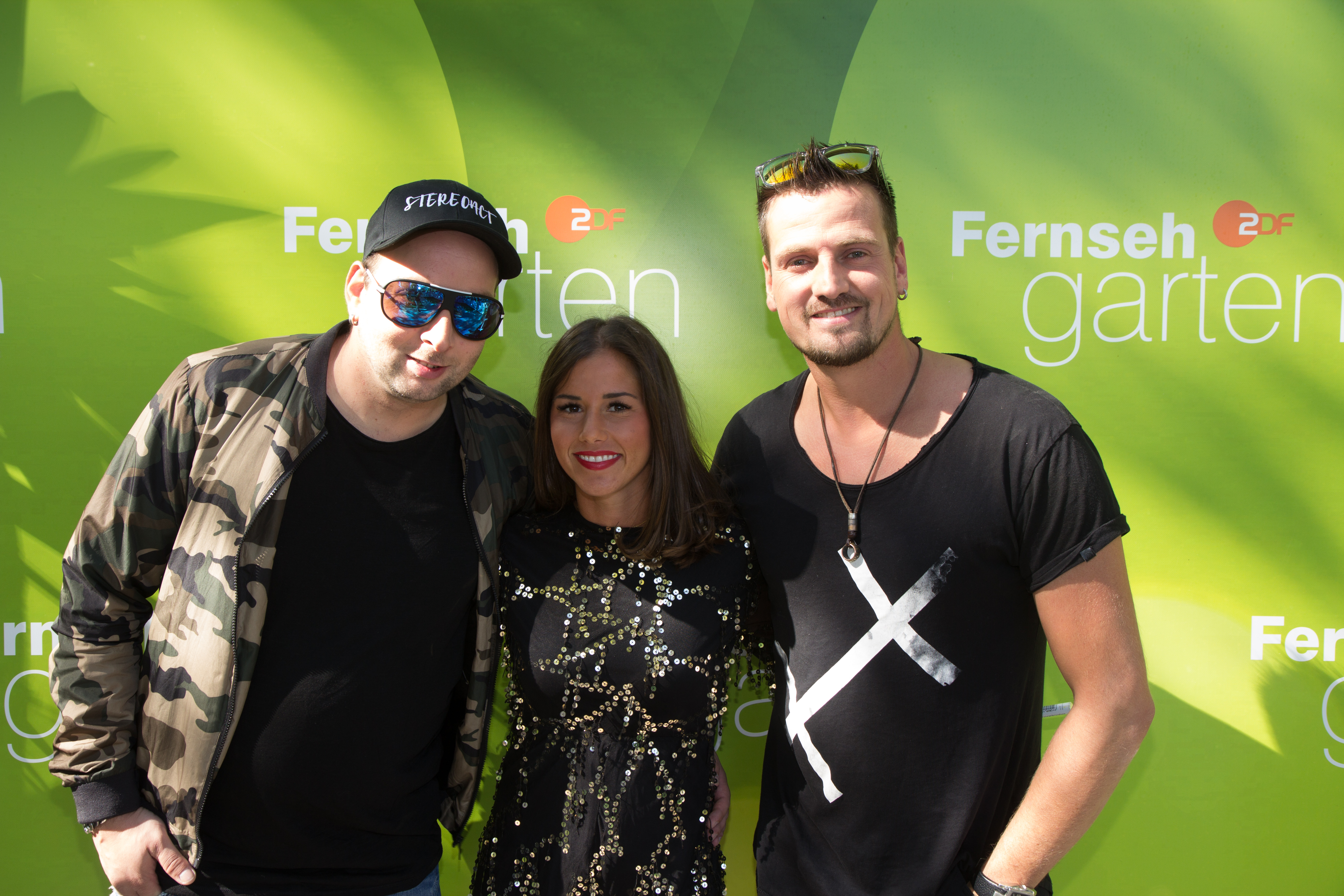 Stereoact feat SARAH als Gast im ZDF-Fernsehgarten am 16. September 2018 in Mainz.